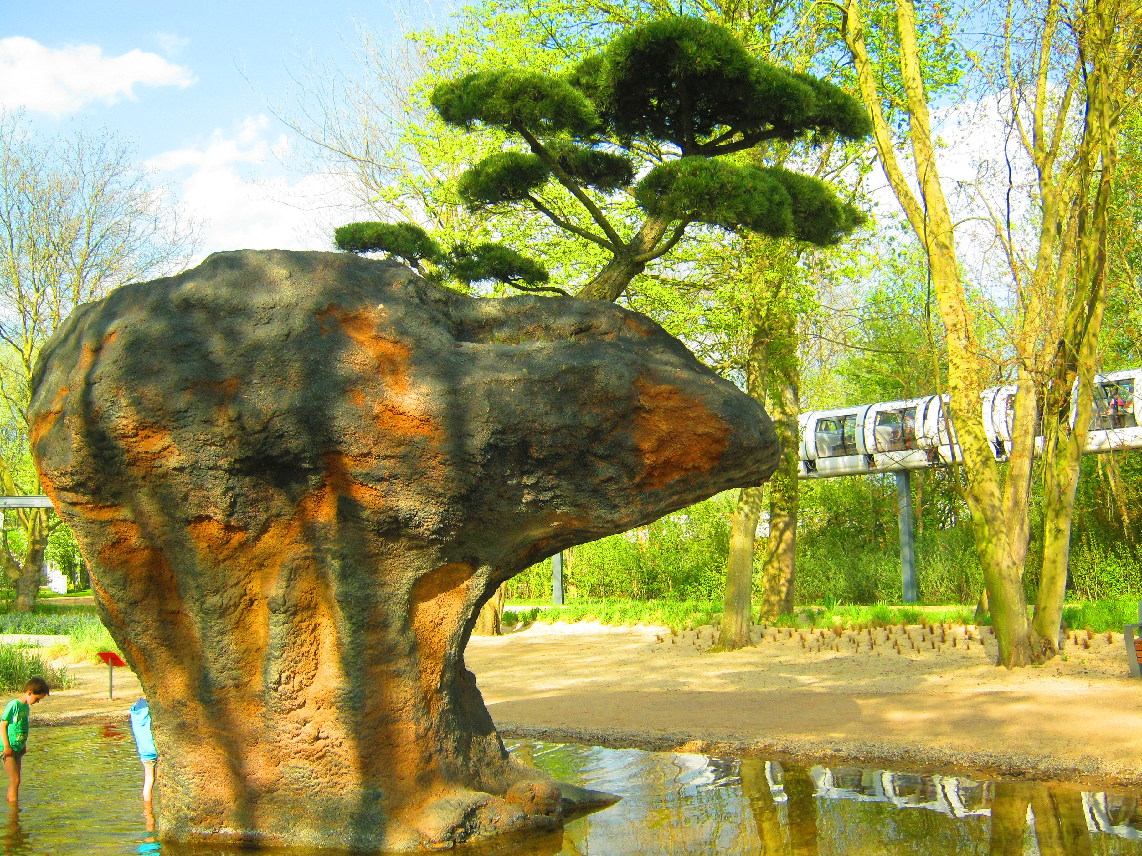 Garten "Sansibar oder der letzte Grund" in der "Welt der Kontinente" auf der Internationalen Gartenschau Hamburg 2013.